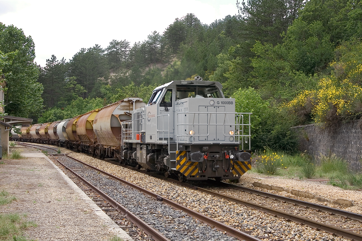 Train de gypse Euro-Cargo-rail à vide en gare de Beaurières